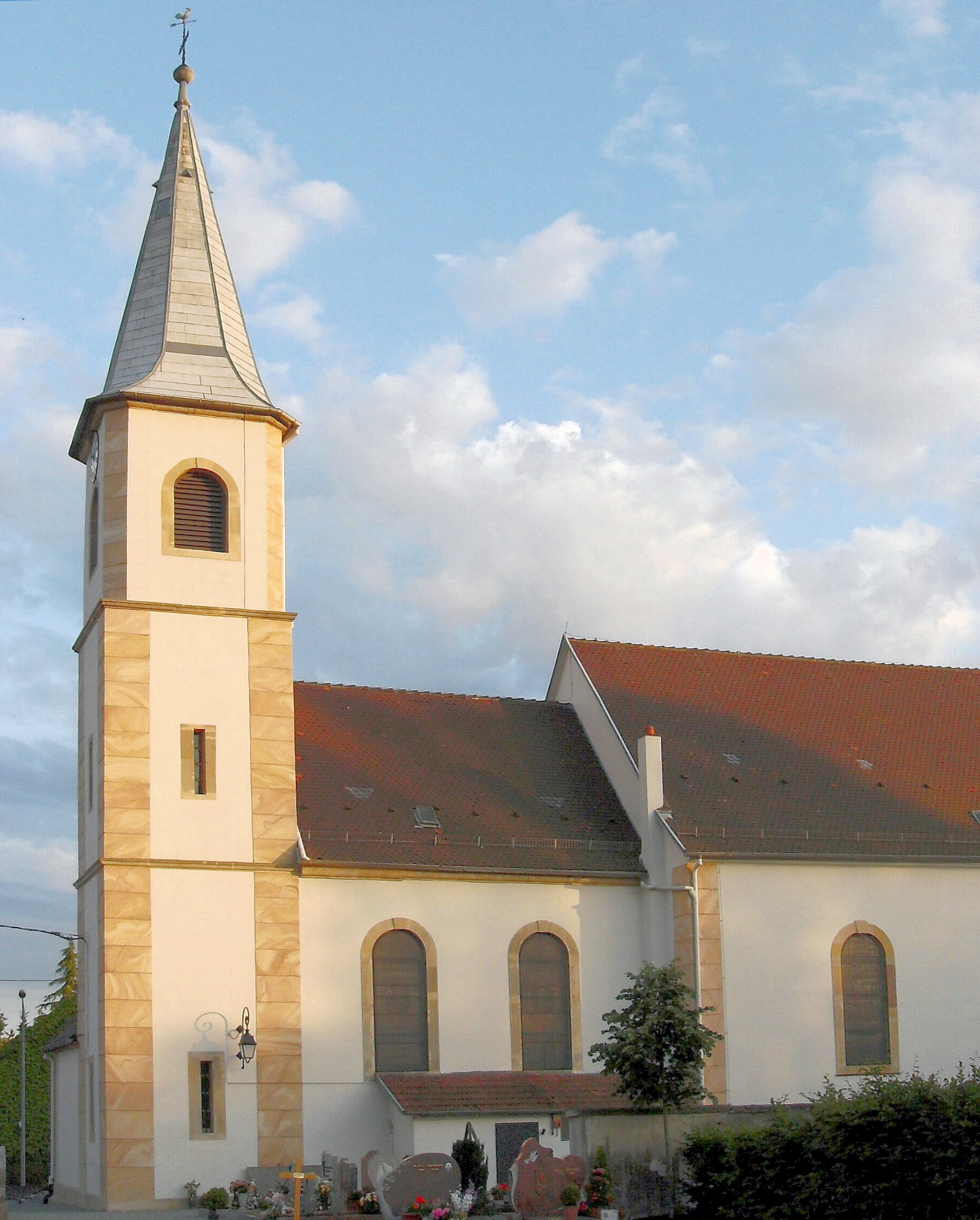 L'église Saint-Pierre d'Hagenbach